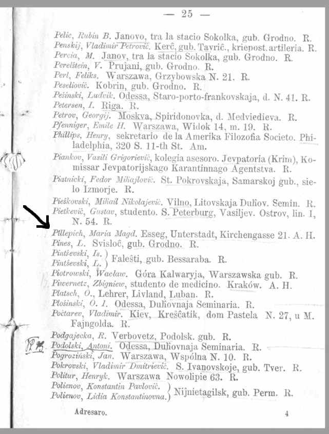 Paĝo de la unua adresaro de esperantistoj (1889), farita de Zamenhof, en kiu aperas la unuaj esperantistoj en Kroatio